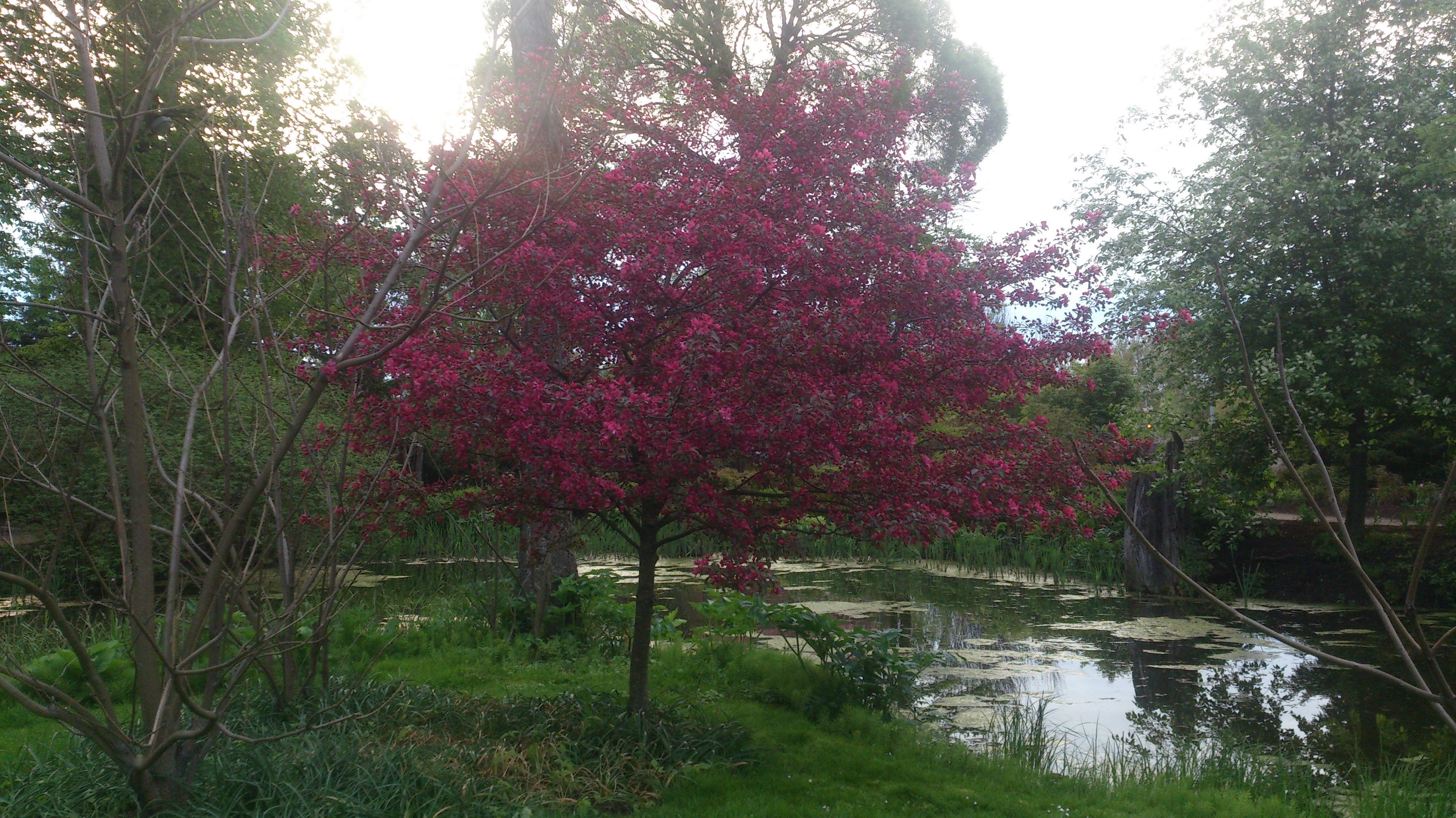 Õunapuu 'August Vaga', Tartu botaanikaaed, 20.05.2015